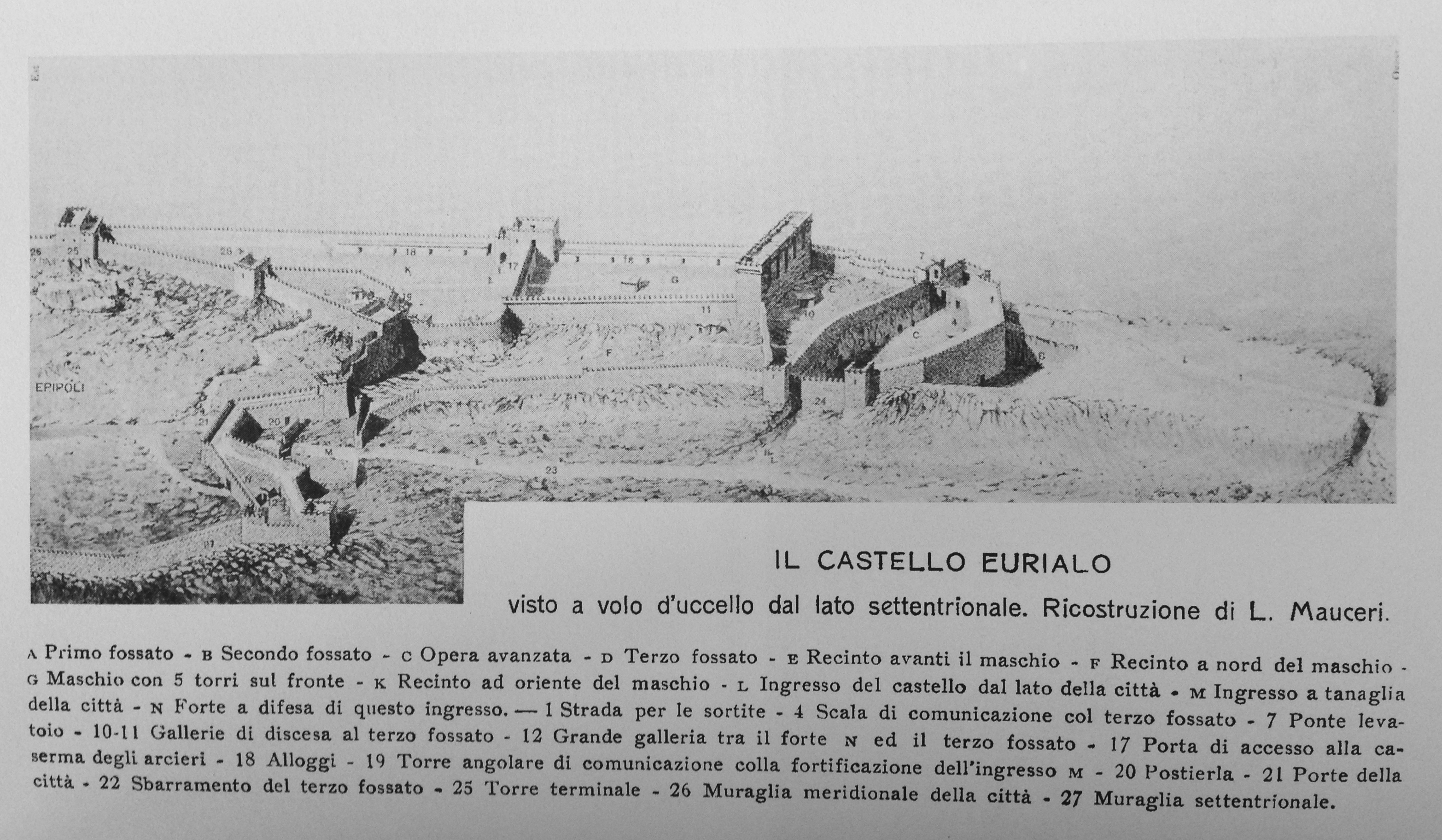 Ricostruzione del castello Eurialo di L. Mauceri